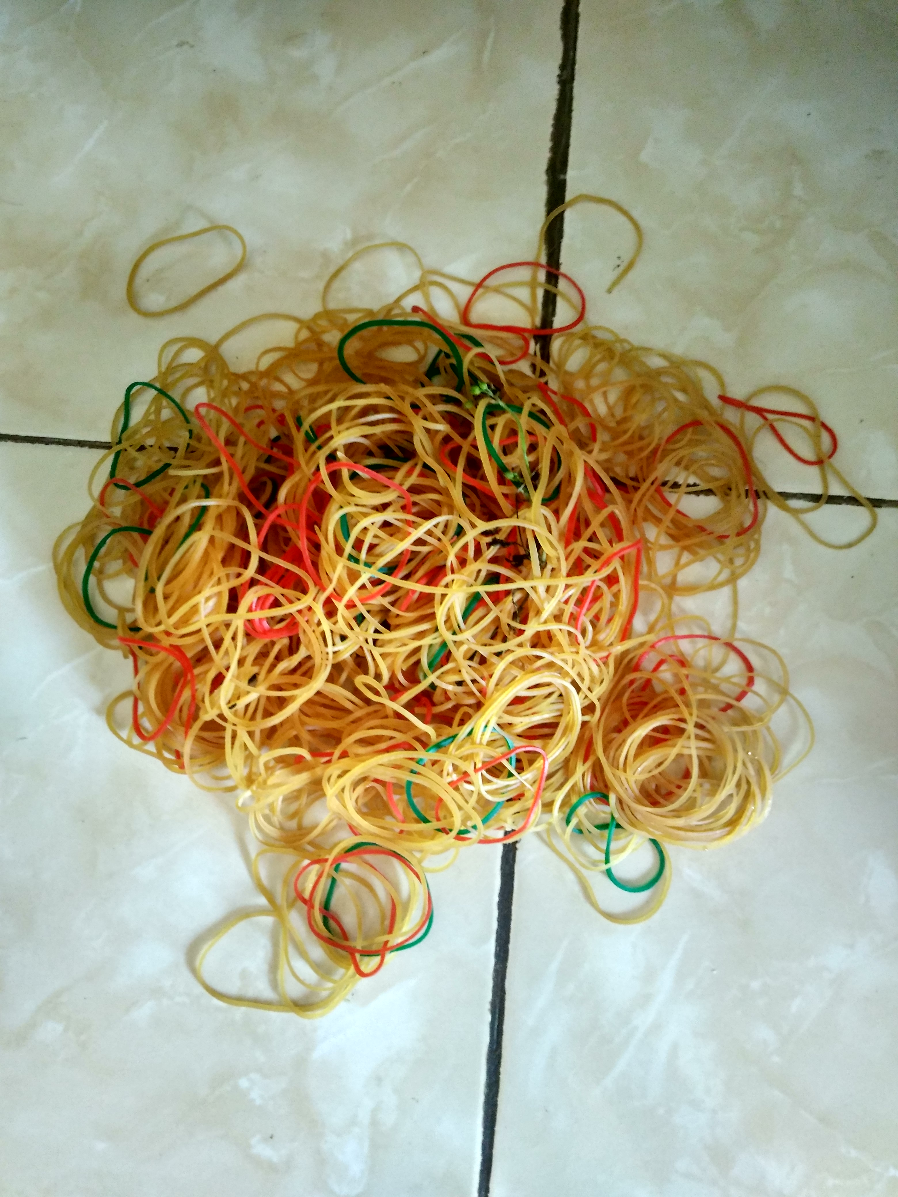 Karet gelang atau gelang karet adalah potongan karet berbentuk gelang yang dibuat untuk mengikat barang. Karet gelang terdiri dari berbagai macam ukuran, dari yang besar hingga yang kecil, dari yang tebal hingga yang tipis. Bahan baku karet gelang adalah karet alami sehingga berwarna kuning. Karet gelang berwarna-warni dihasilkan dengan menambahkan bahan pewarna. Produsen juga ada yang membuat karet gelang tahan minyak dan tahan segala cuaca. Sebagian besar karet gelang dibuat dari karet alami yang merupakan hasil pengolahan lateks dari pohon karet. Karet gelang juga dibuat dari karet sintetis, tetapi kalah populer dari karet alami yang elastis.